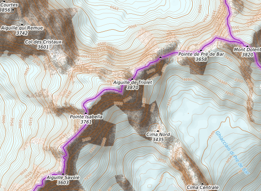 Carte réalisée sur umap This map may be incomplete, and may contain errors. Don't rely solely on it for navigation.